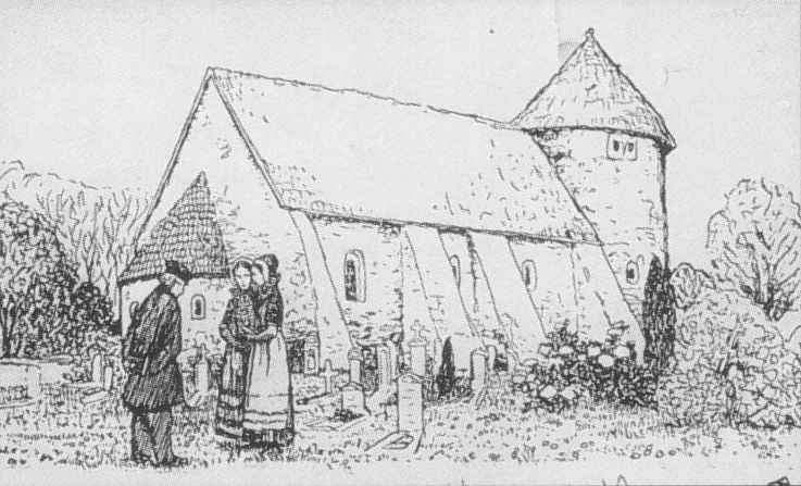 Heeslinger Kirche, Zeichnung